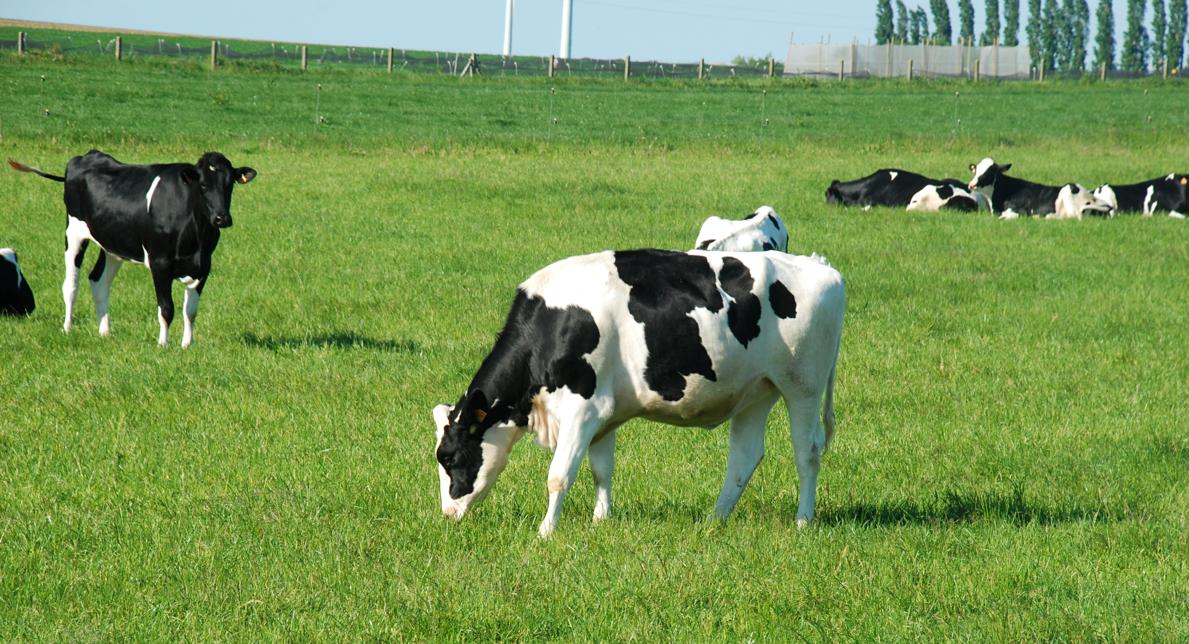 Vaches en pâture